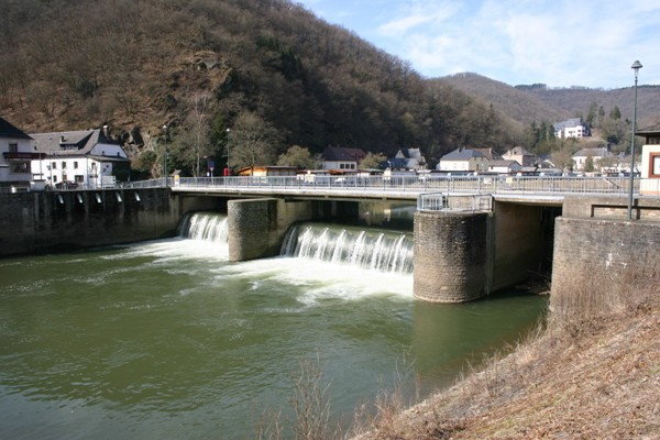 Bréck vu Stolzebuerg